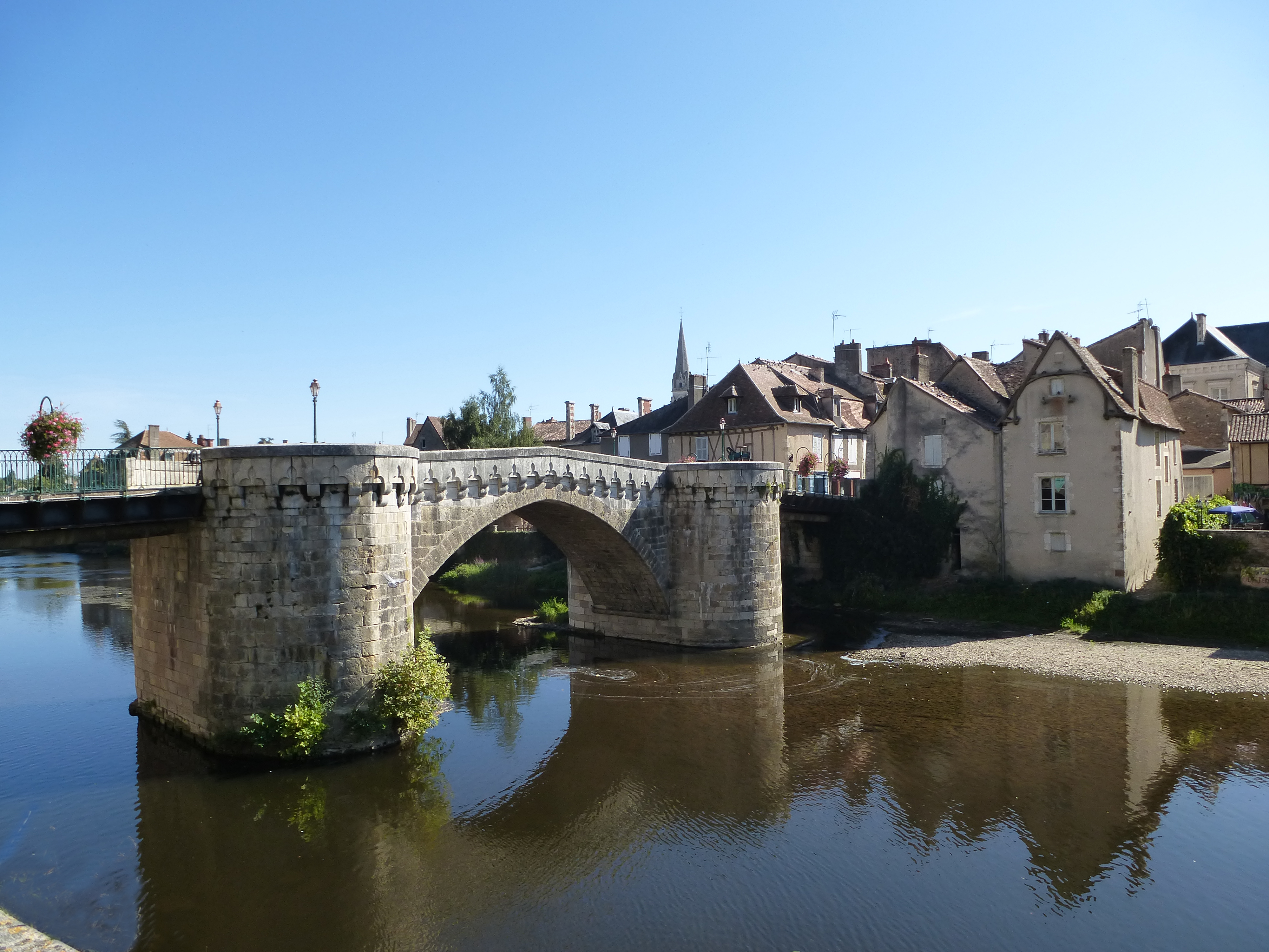 Pont sur la Gartempe